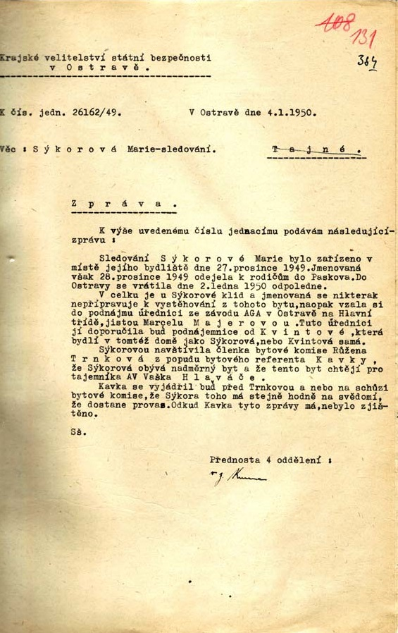 Zpráva o sledování manželky M. Sýkory Marie ze dne 4. 1. 1950. Svědectví o přístupu k podezřelému ve vyšetřovací vazbě. Několik měsíců před procesem se zde předkládá jako prakticky jisté, že majetek vyšetřovaného bude zabaven, o byt má zájem jistý funkcionář („tajemník akčního výboru“) a manželka se má připravit na vystěhování, neboť M. Sýkora „dostane provaz“ (zdroj: ABS)